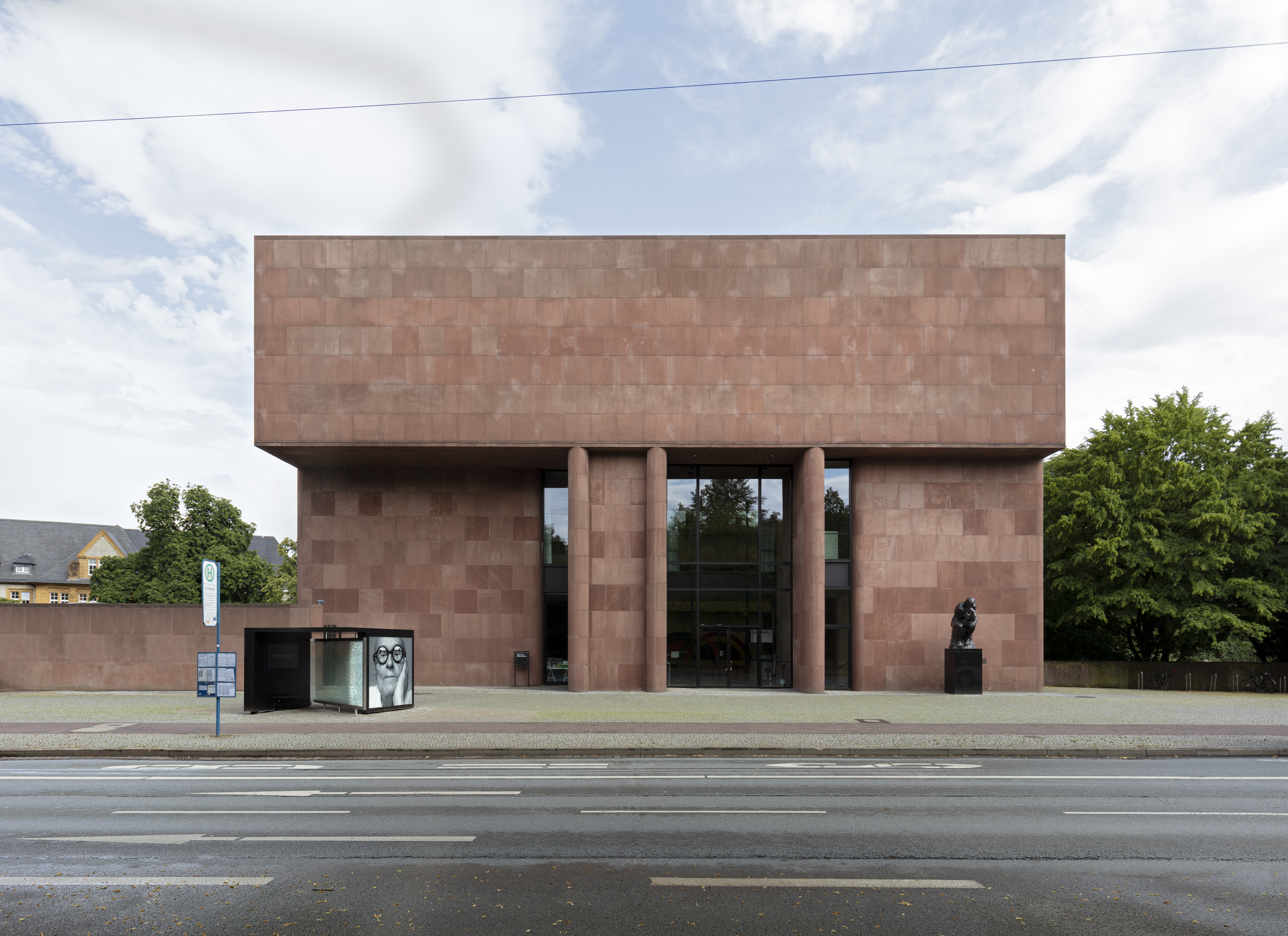 Kunsthalle Bielefeld, 2019, Ansicht von der Straße